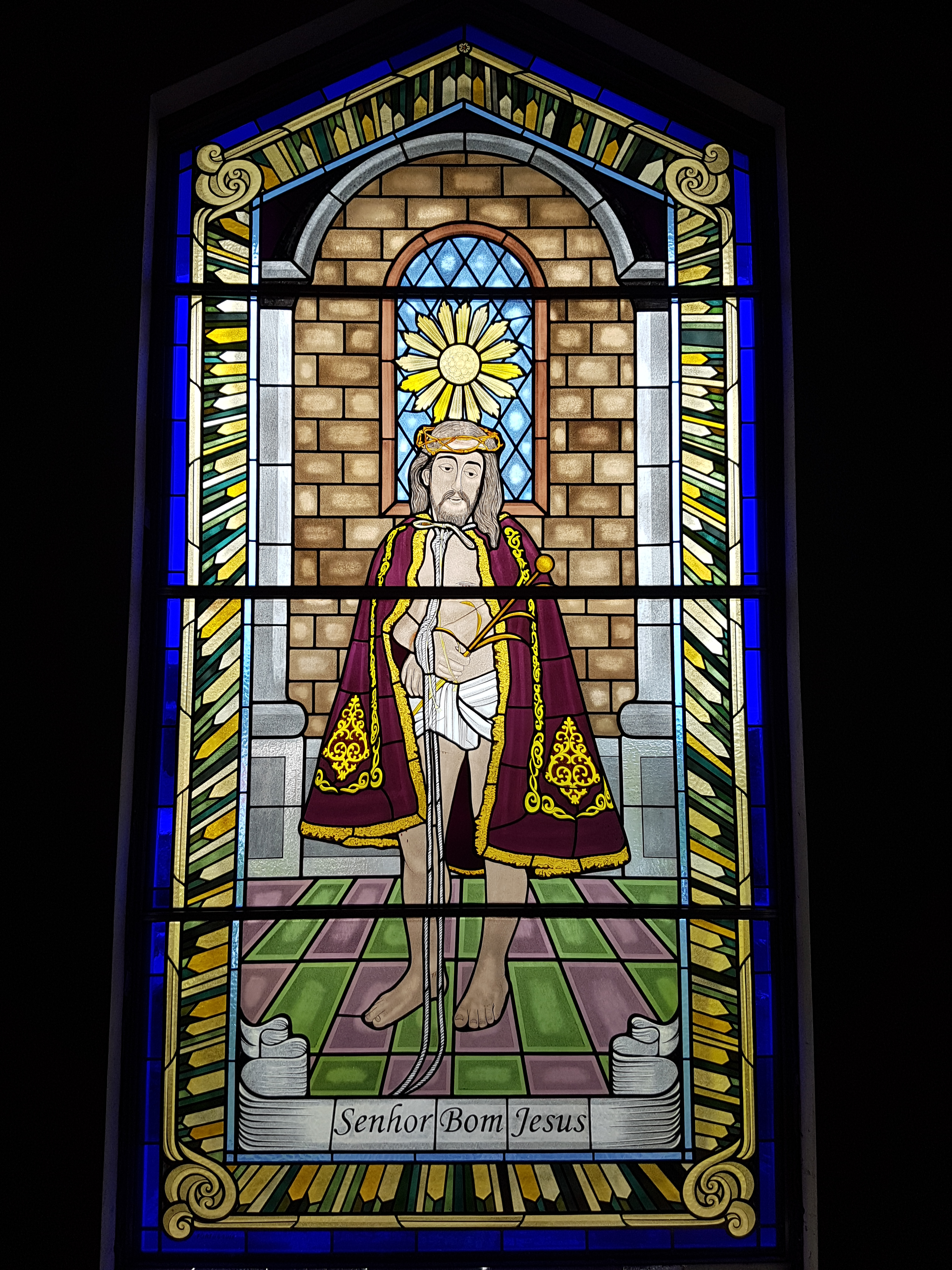 Vitral do frontispício da ermida. Está foto foi captada durante o dia, no interior do templo.